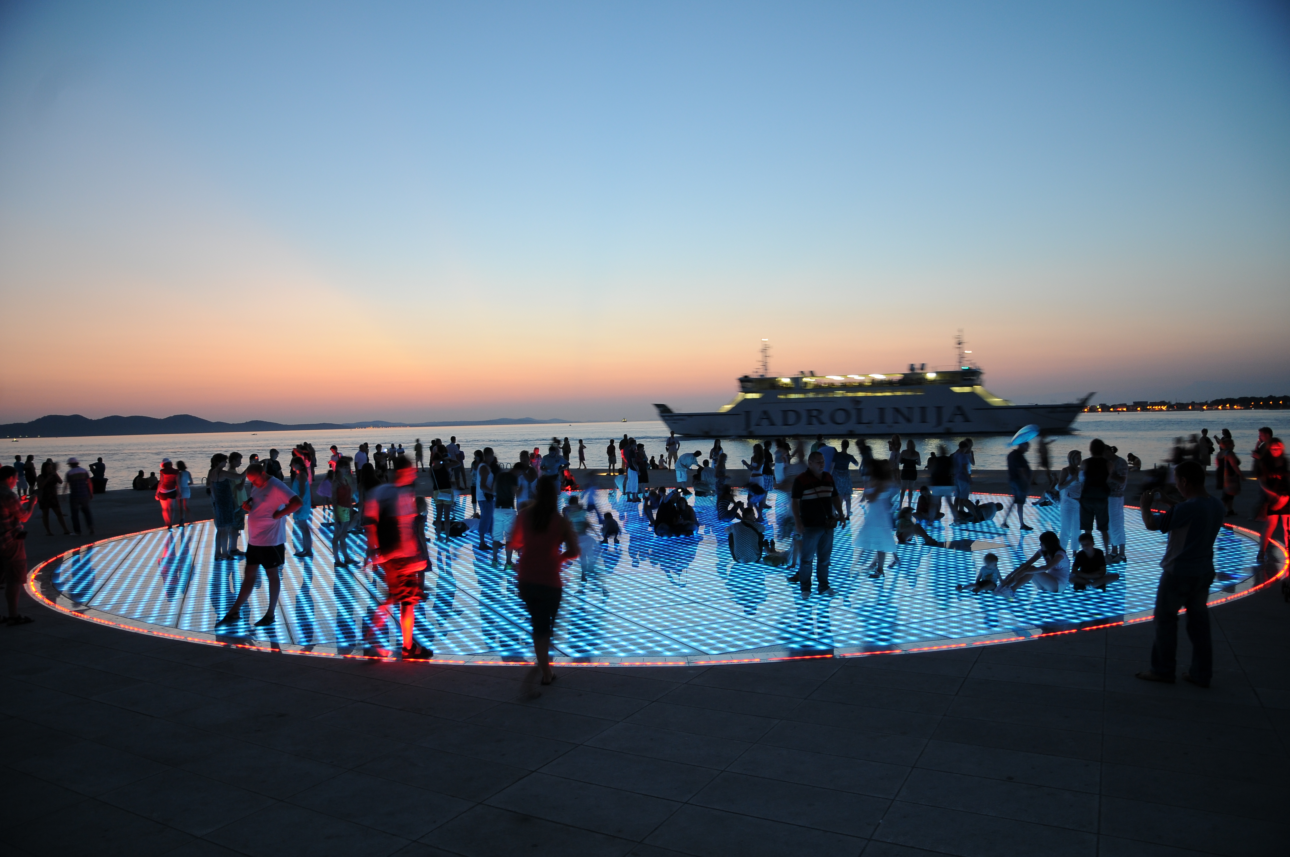 "Gruß an die Sonne" in Zadar. Erbaut nach Plänen des Architekt Nikola Bašić. Der Kreis misst im Durchmesser 22 Meter und besteht aus 300 begehbaren Glasplatten. Zum Sonnenuntergang erzeugt ein effektvolles Lichtspiel, das mit dem Rhythmus der Wellen und der Klänge der Meeresorgel folgt, ein wunderschönes Szenario. Im Hintergrund das Fährschiff der Jadrolinija.